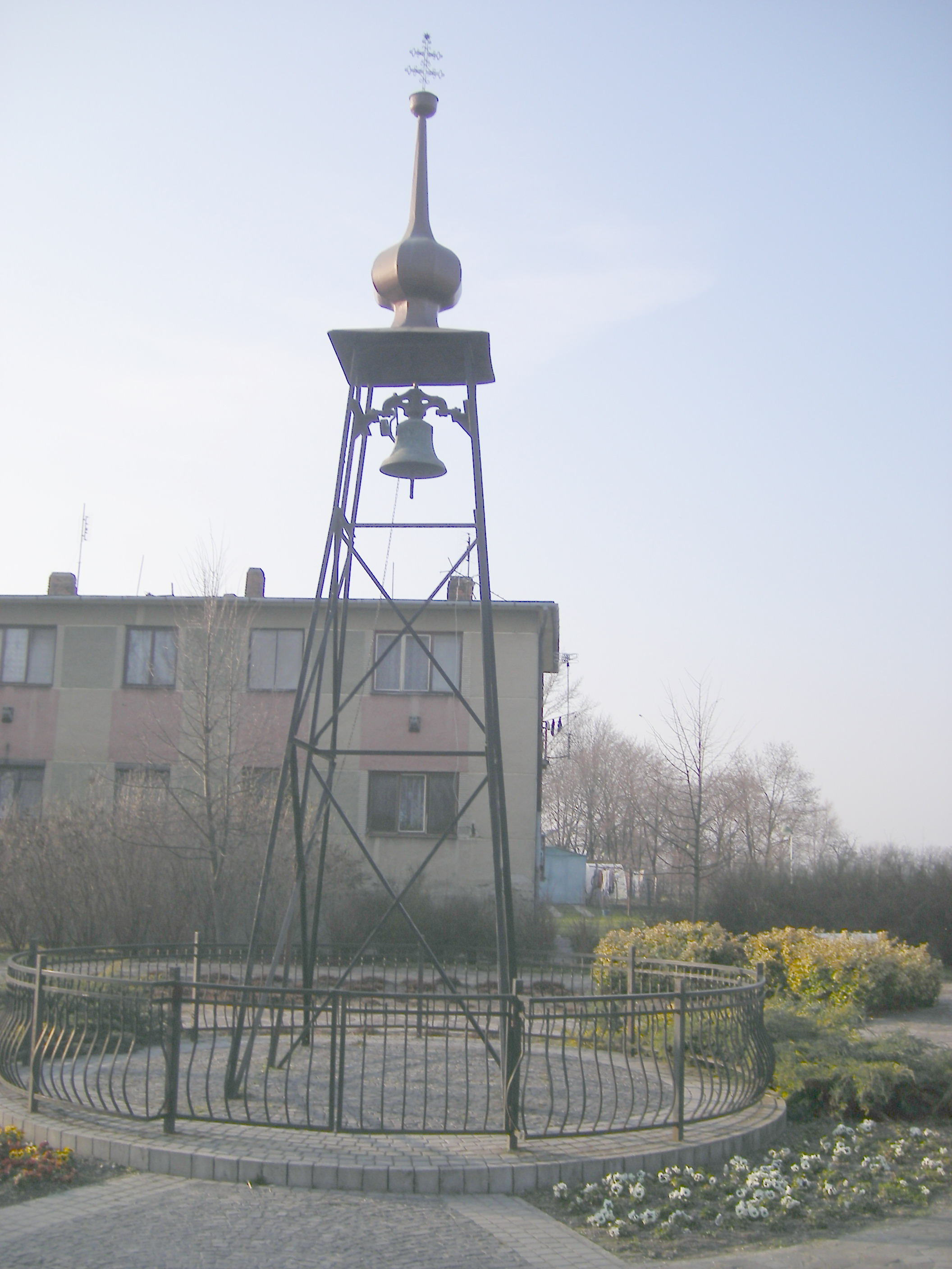 Zsemlékes - harangláb